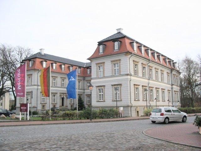 Schloss Neustadt-Glewe, Castle of Neustadt-Glewe (Germany)